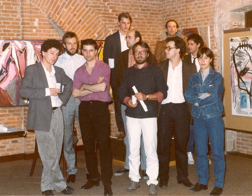 Peter Proost, Christian Van Haesendonck, Gery De Smet, Pieter Wittenov, Dirk Wendelen, Michel Franssens, Eric Pil, Guy Van den Heule, Louis Peeters, Marijke Van Neygen